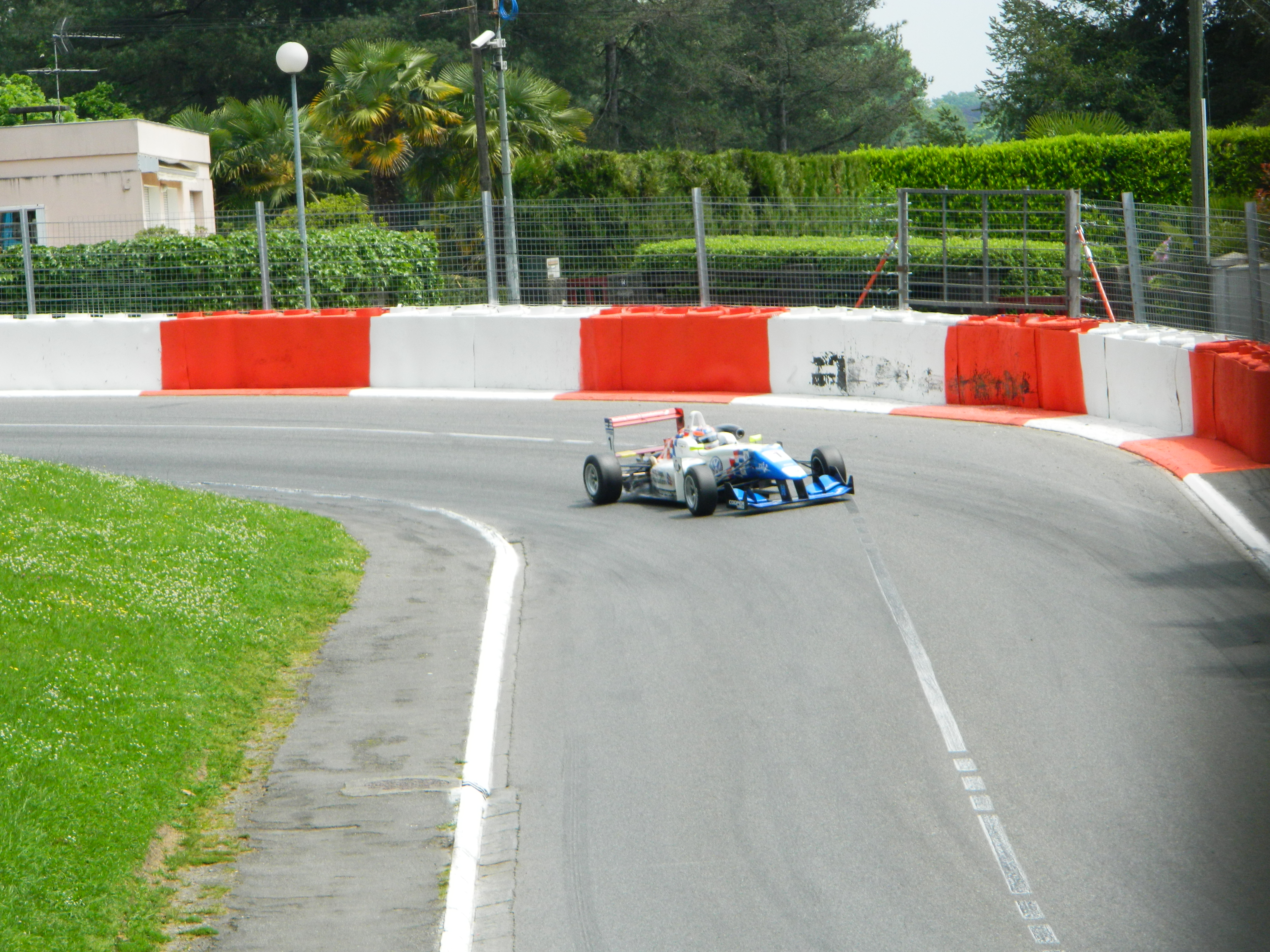 Jack Harvey sur Formule 3 lors du Grand Prix de Pau 2012.